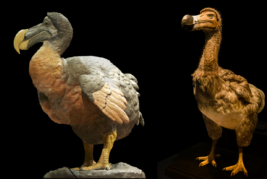 Combined image File:Dodo NHM Wien.jpg (self/cc-by-sa-3.0) and File:Dronte dodo Raphus cucullatus.jpg (self/Cc-zero)